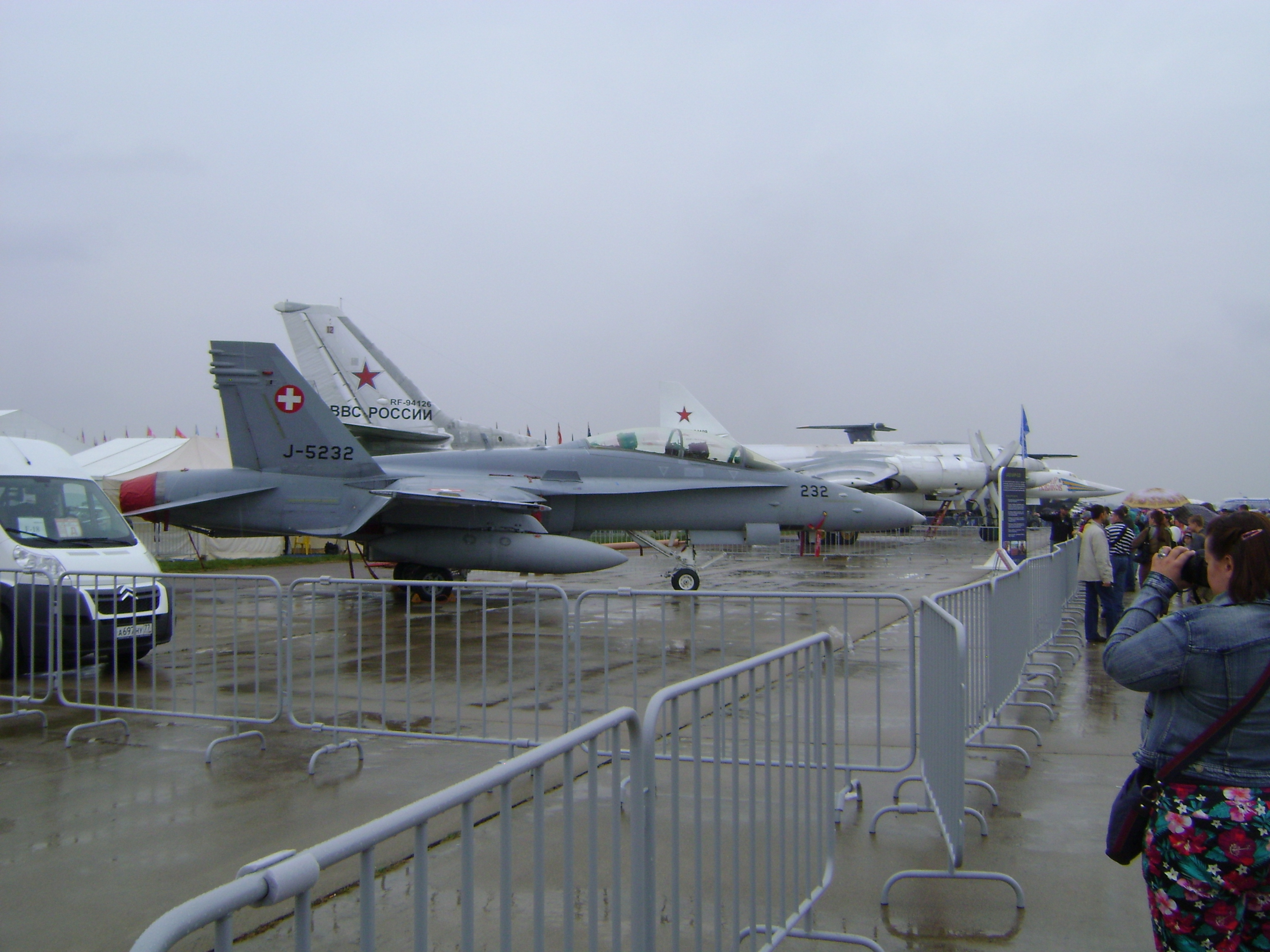 Swiss F/A-18D